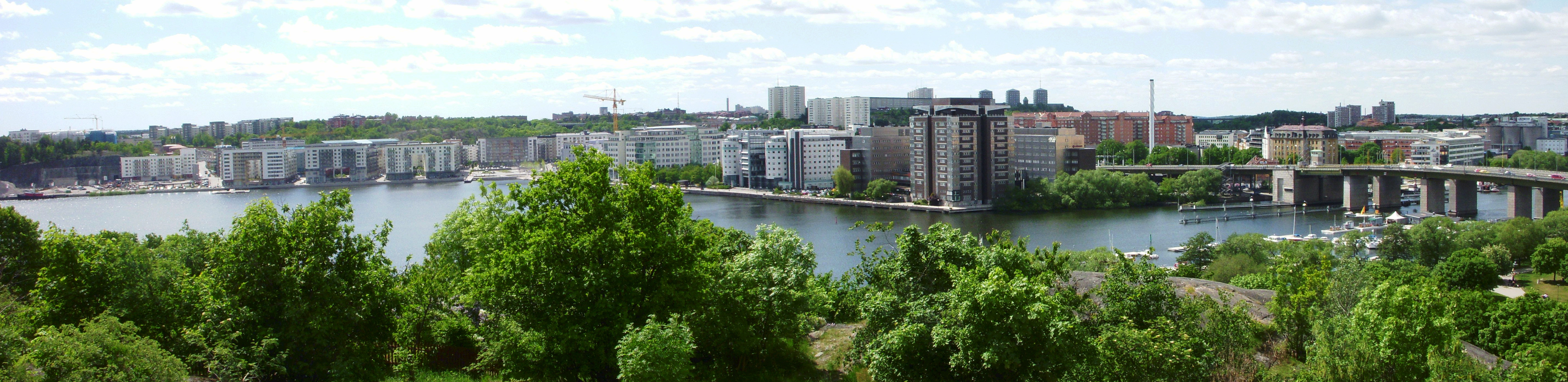 Panorama över Liljeholmen från Tantolunden